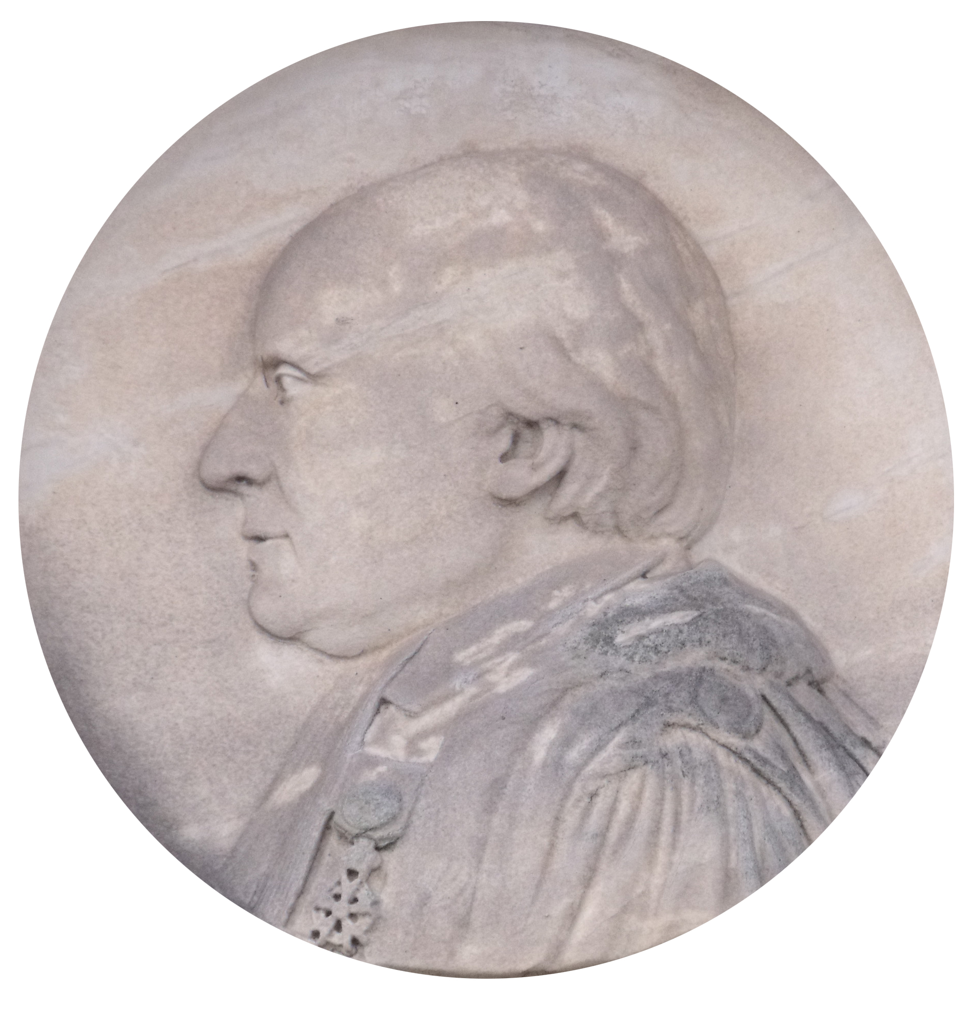 Alexandre de Fauris de Saint-Vincens (1750-1819). Portrait funéraire.